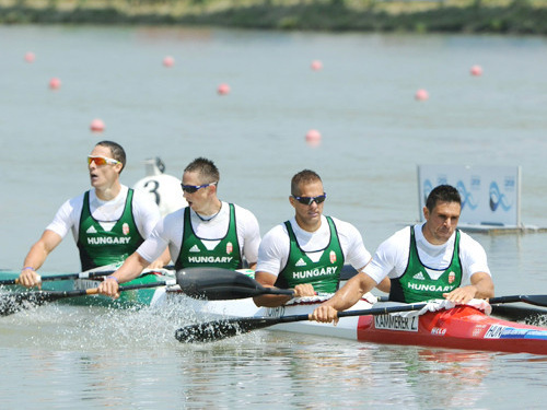 Kammerer Zoltán, Tóth Dávid, Kulifai Tamás és Pauman Dániel a 2013-as Kajak-kenu Világkupán (Szeged)